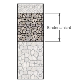 Straßenaufbau mit Darstellung der Binderschicht